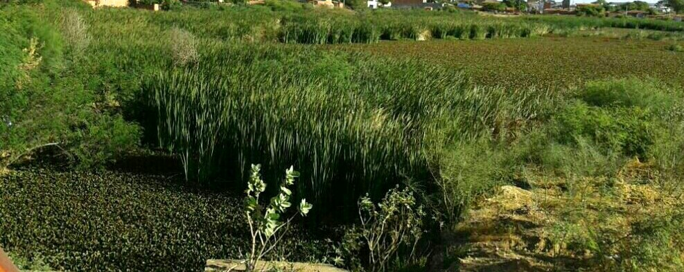 Lagoa Eutrofizada (Xique-Xique Ba).Crescimento excessivo de plantas aquáticas, resultado do processo de eutrofização.